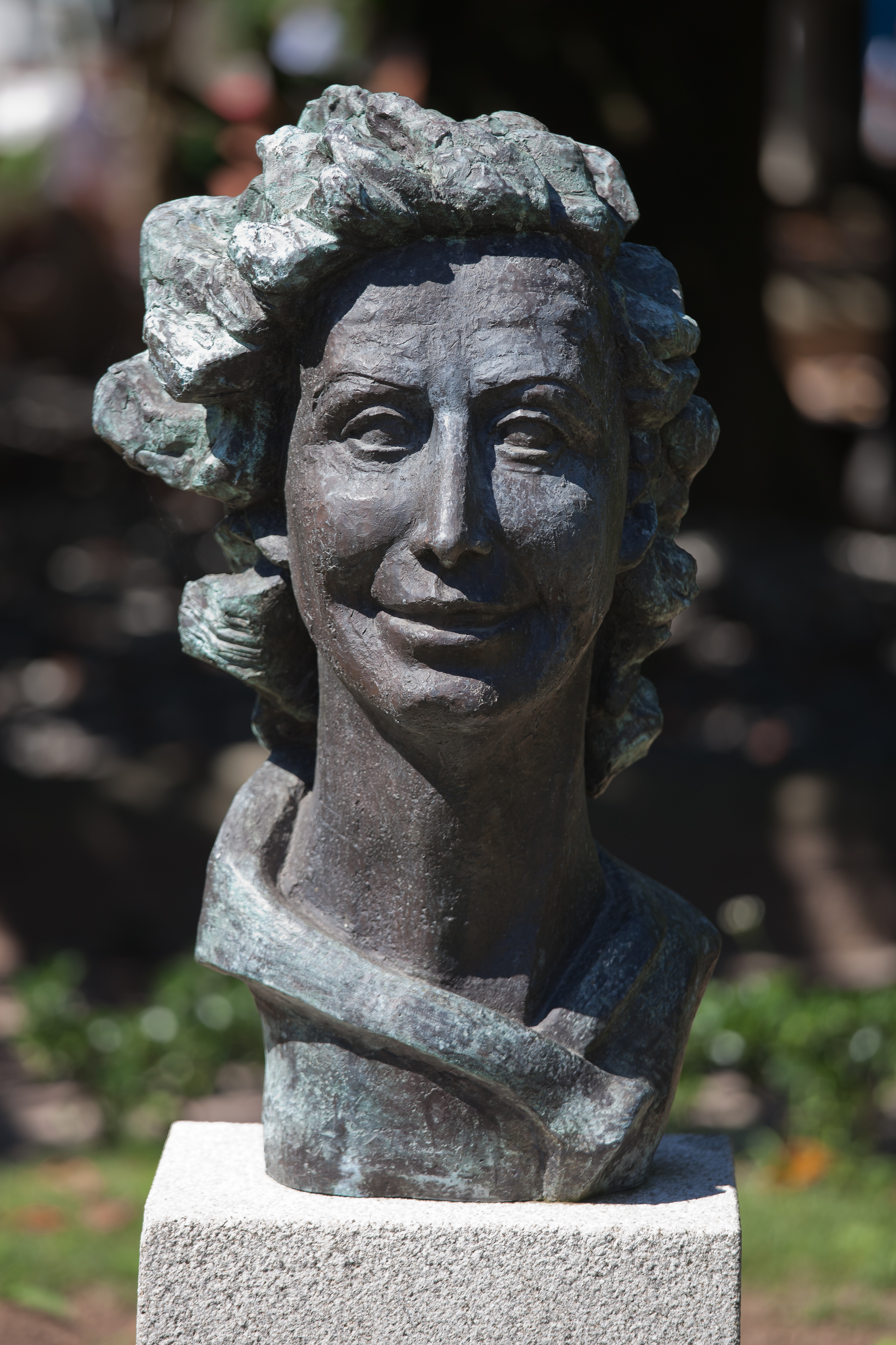 Busto de María Mariño, Noia, Galiza